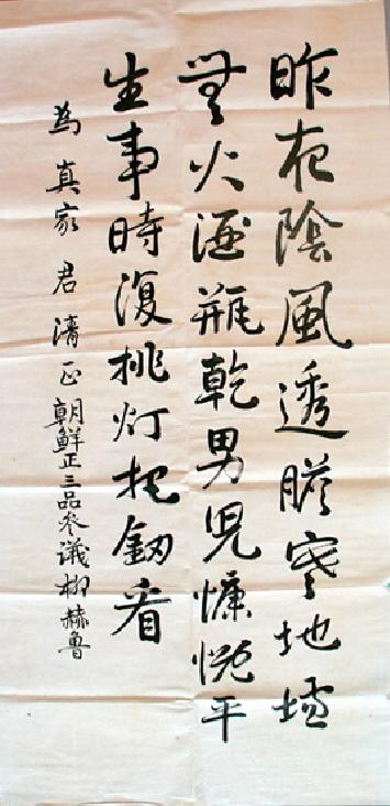 류혁로 참의 재직 중 서예작